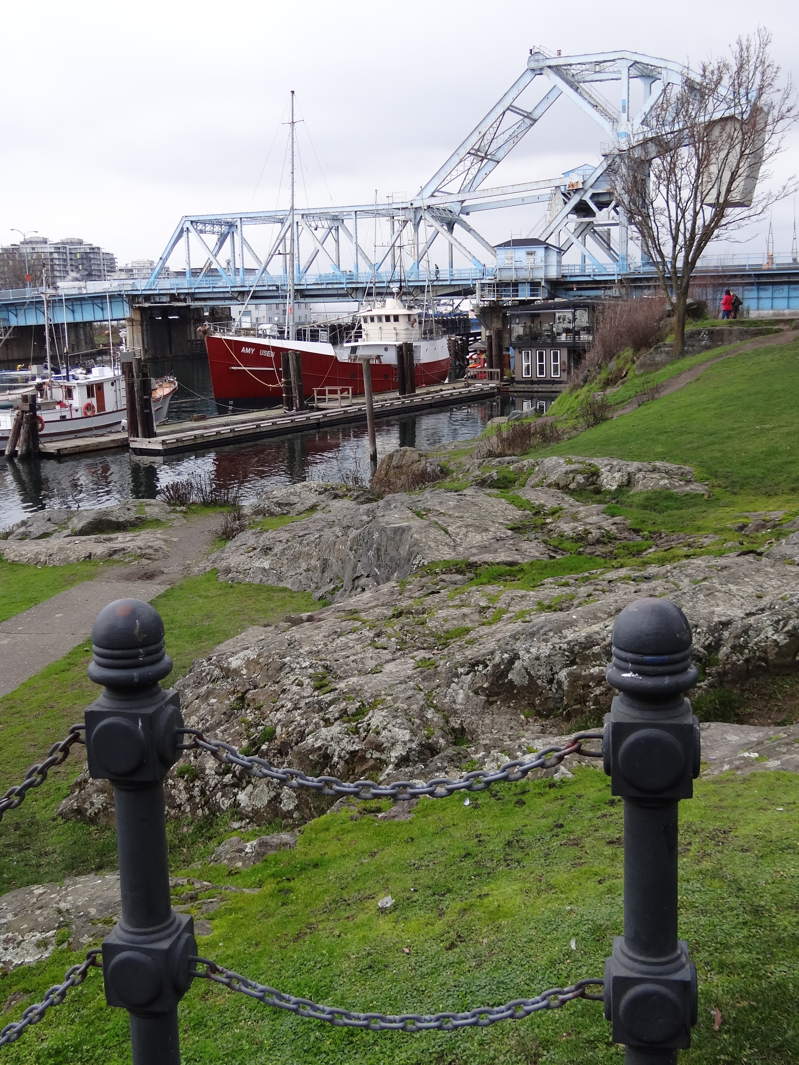 Victoria in Gray - Victoria, BC - Canada - 06